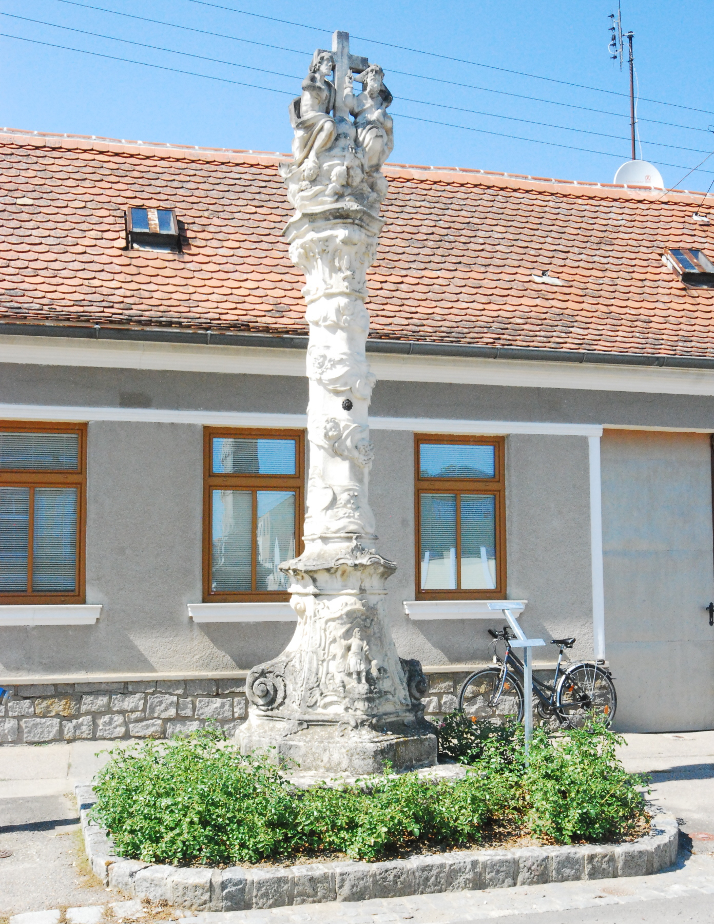 Dreifaltigkeitssäule in Zellerndorf in Niederösterreich